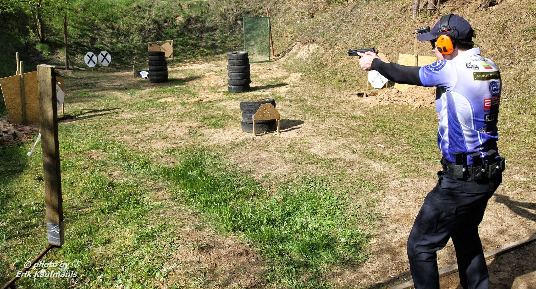 Praktinio šaudymo sportas